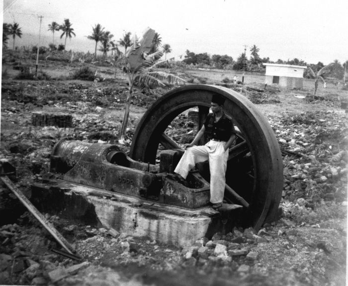 Foto. Het terrein van de NIMEF-fabriek te Kendalpajak ten zuiden van Malang na de verwoesting door de bevolking, op 28 februari 1951.